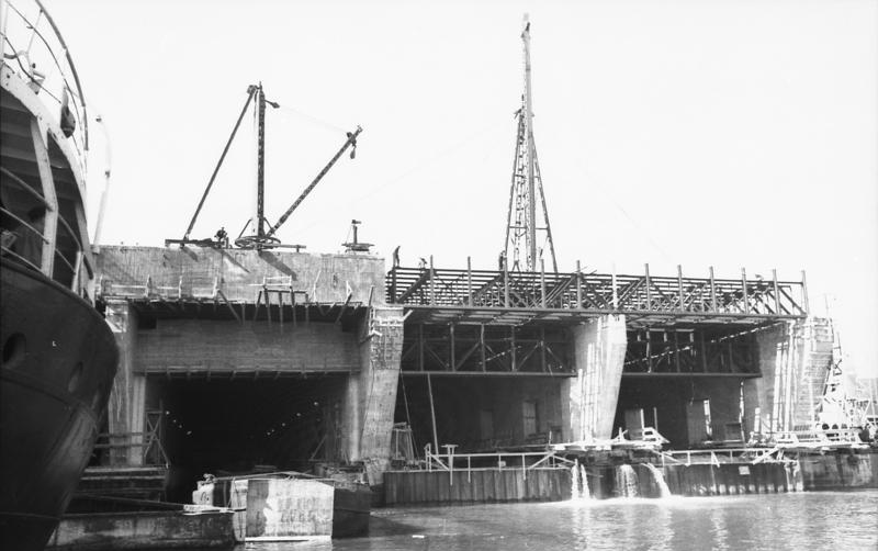 Scherl: Im besetzten Gebiet (Frankreich) Hier baut die Kriegsmarine. Baustellen am Atlantik MPK-Aufnahme: Kriegsberichter :Haring, September 1941, [Brest] 988-42